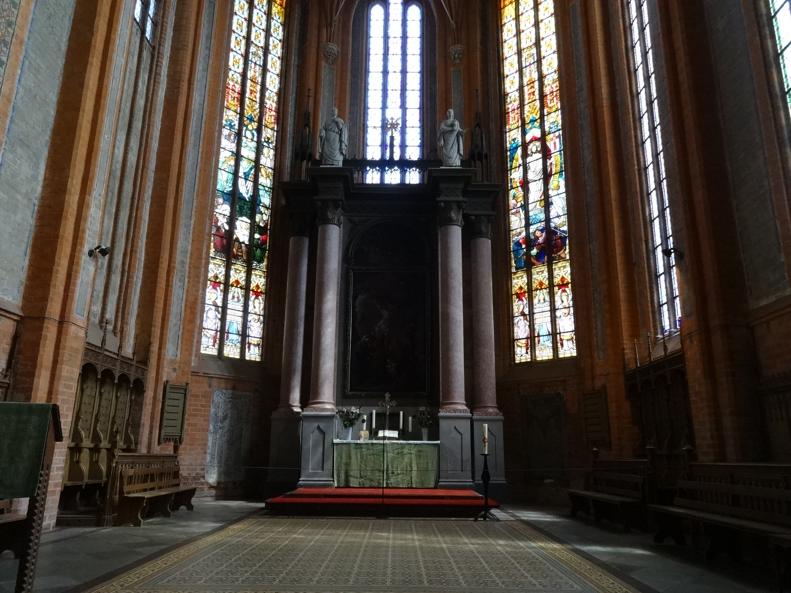 Die Johanniskirche wurde als dreischiffige Basilika im Stil der Backsteingotik erbaut. Sie steht in Malchin in Mecklenburg-Vorpommern.